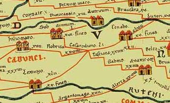 fragment de la table de Peutinger centré sur Casaroduno (Tours)